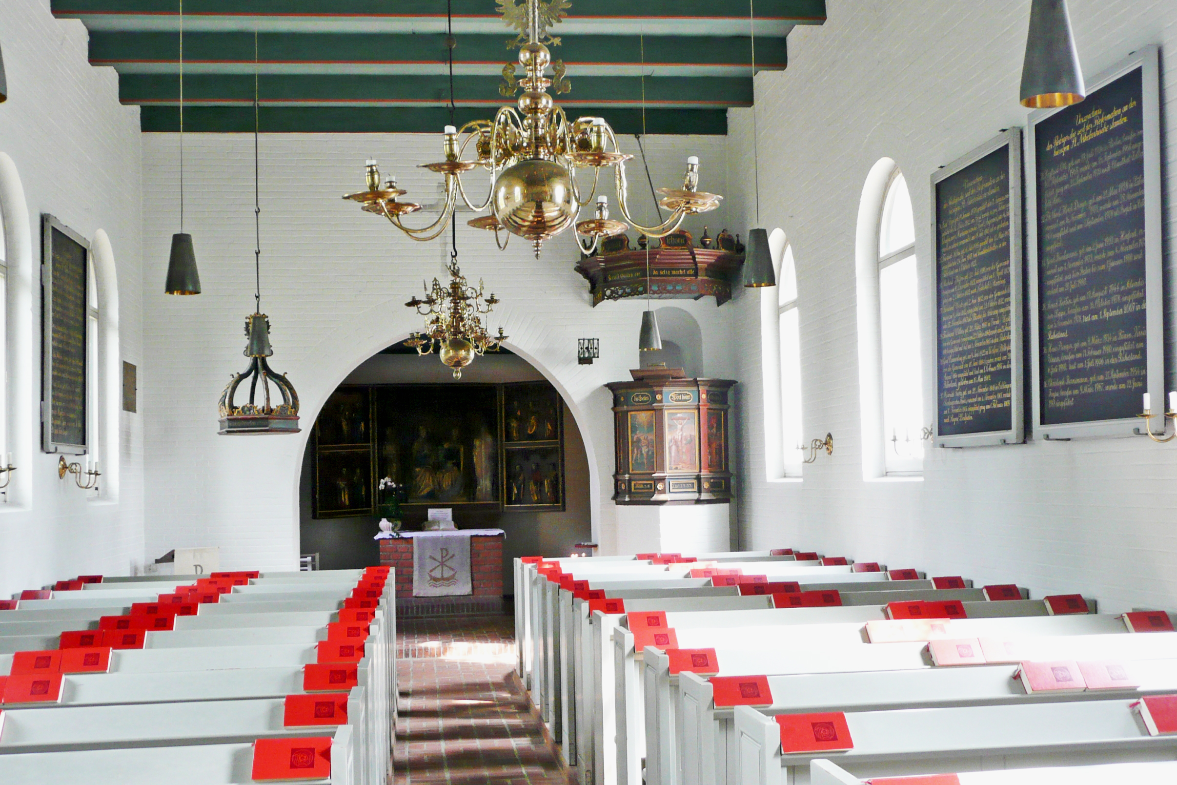 St. Niels (Westerland) Innenraum